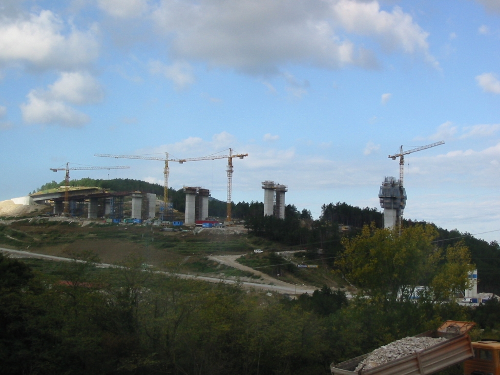 Črni_Kal_gradnja_2002.